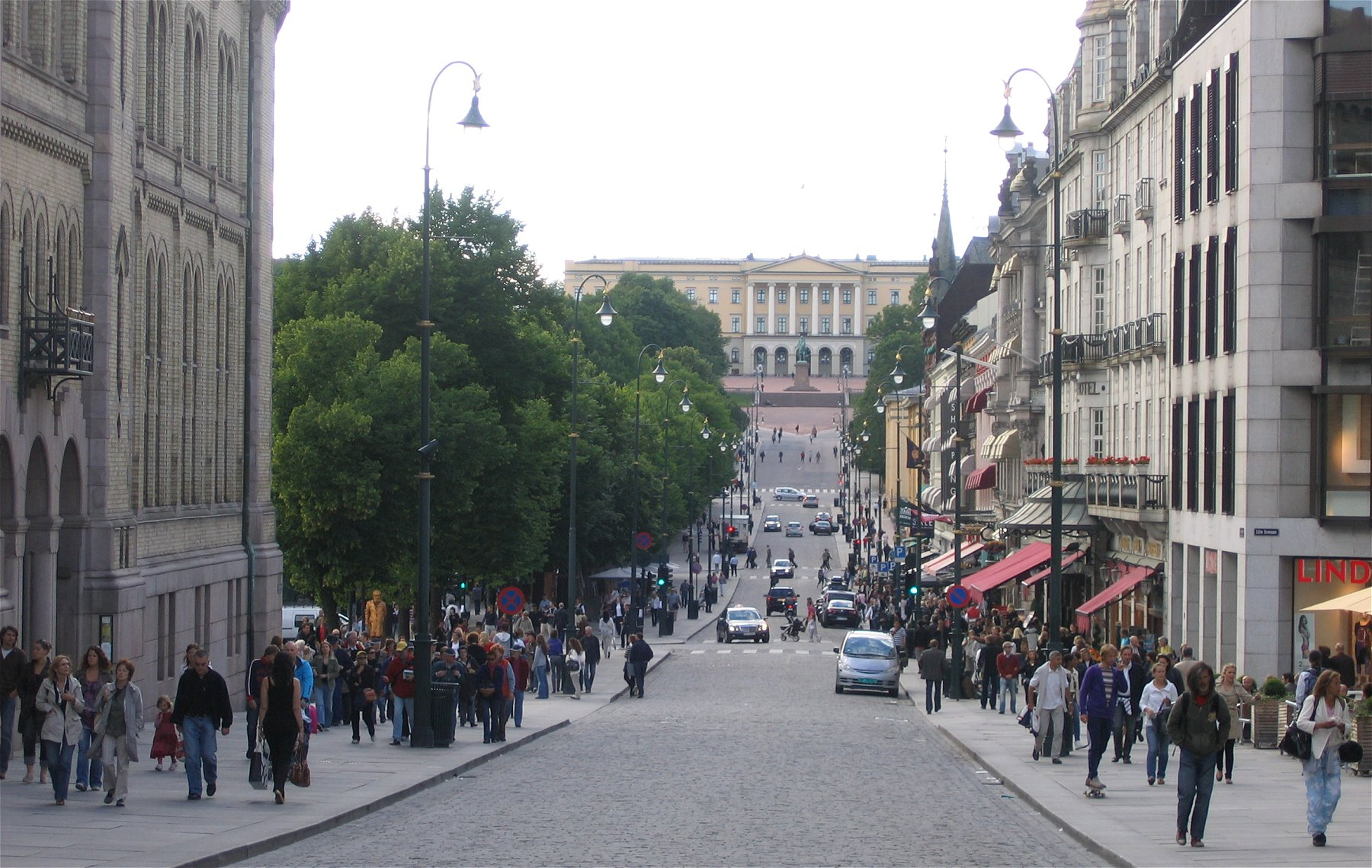 Karl Johans gate, Oslo, Norwegen, im Hintergrund das Schloss